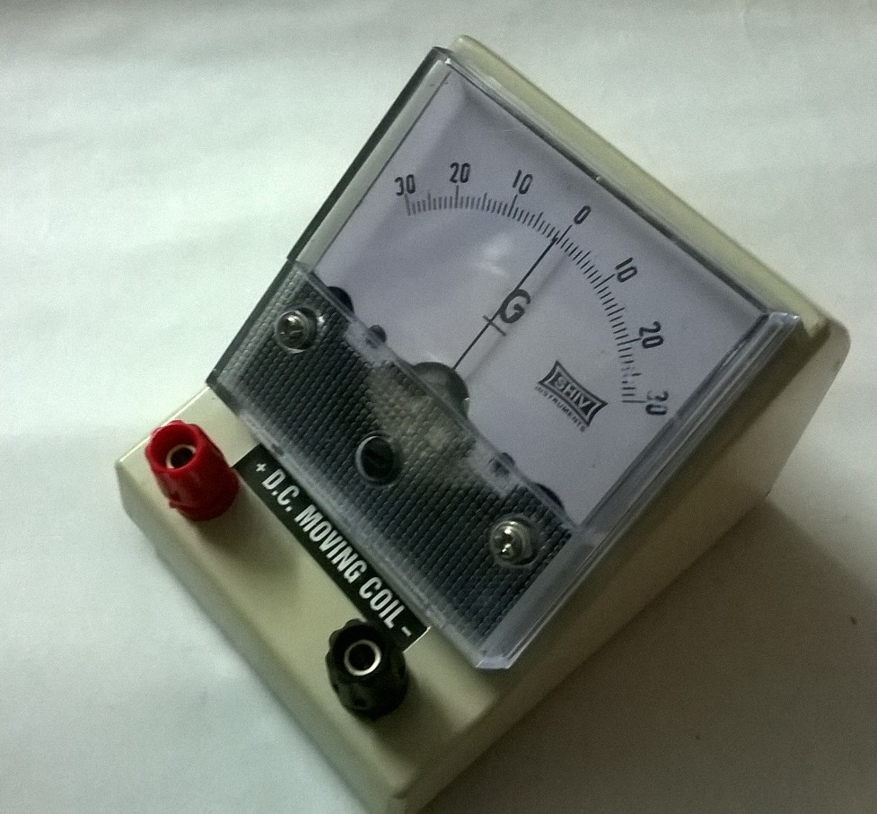 గాల్వనో మీటరు